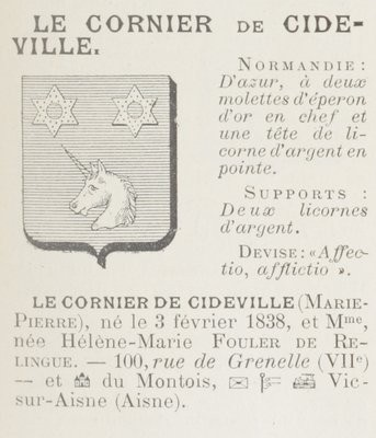 Annuaire héraldique